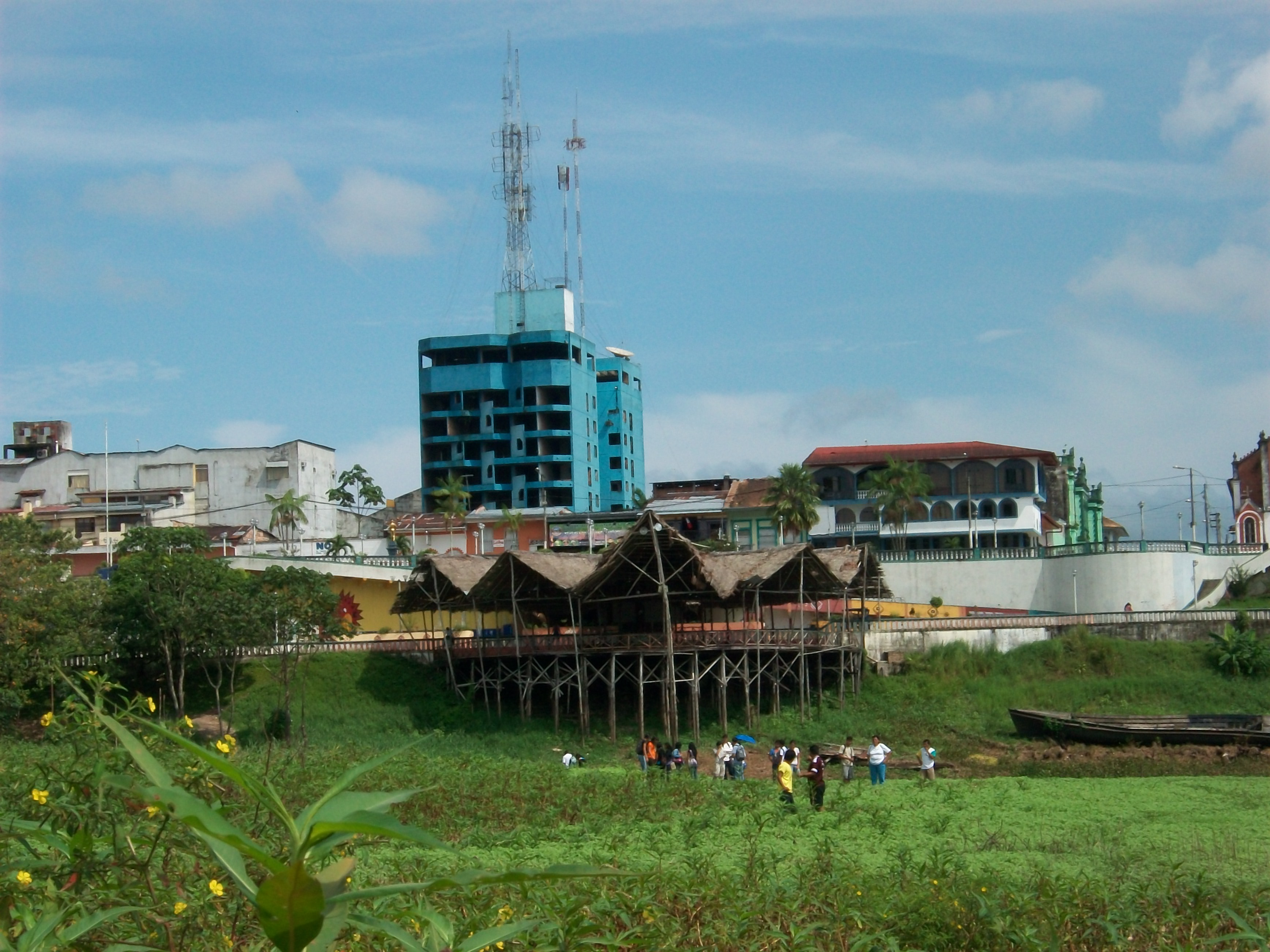 Vista actual de la ciudad de Iquitos